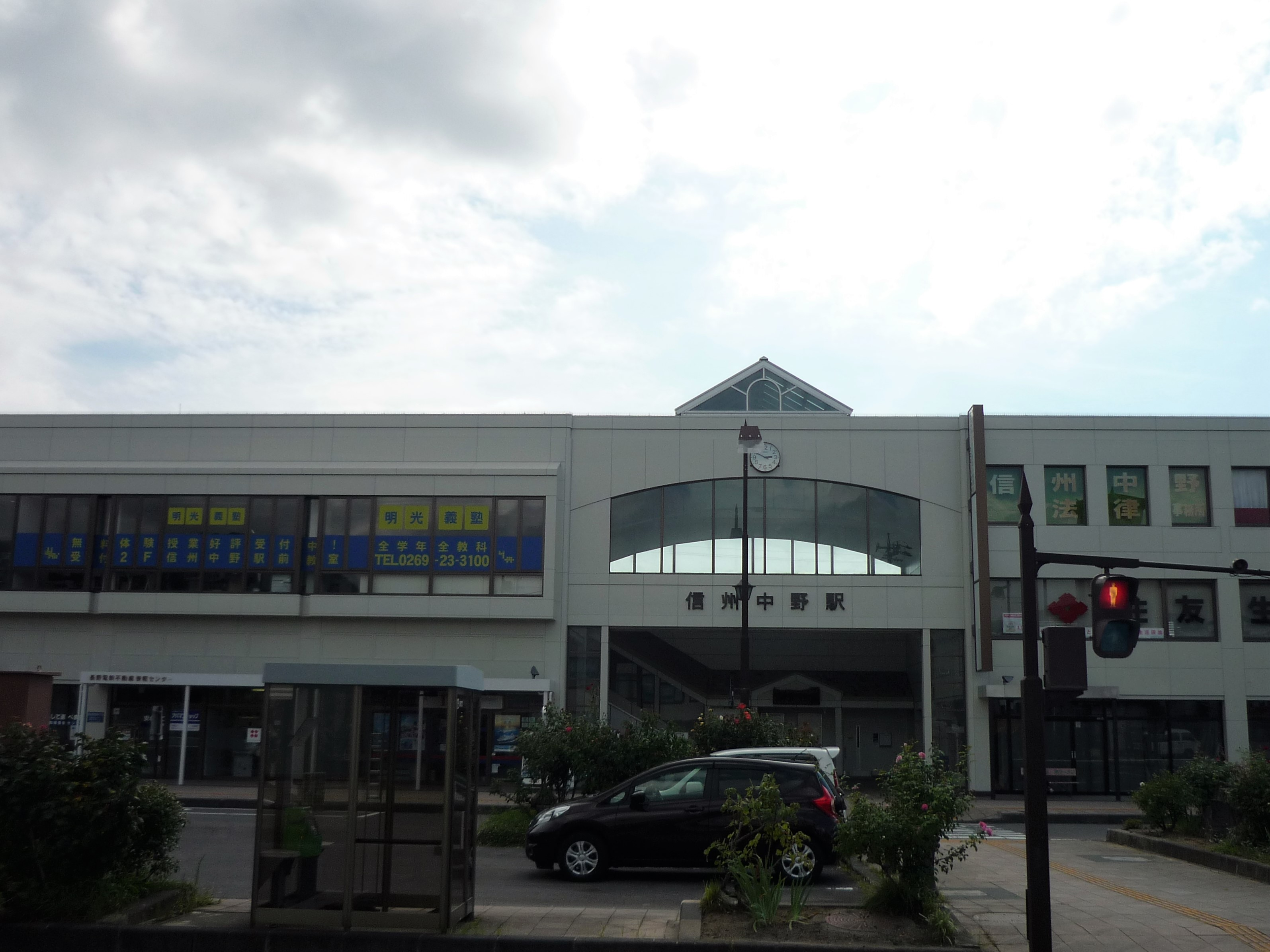 信州中野駅・駅舎